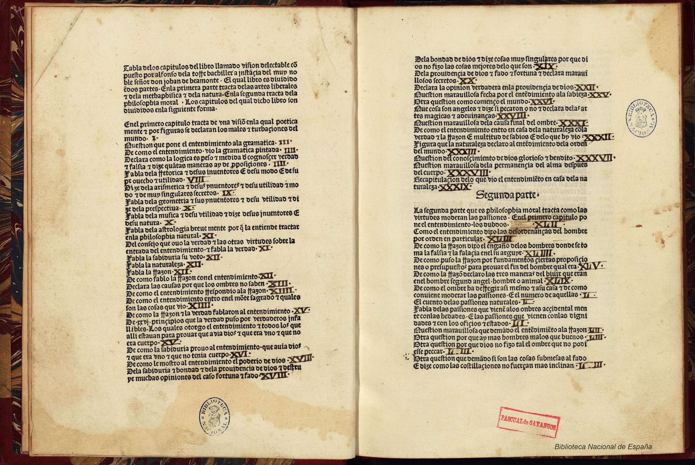 Visión deleitable Autor: Torre, Alfonso de la (m. 1460) Fecha: 1485 Datos de edición: [Burgos] [Fadrique de Basilea] (Biel de Basilea, Fadrique)